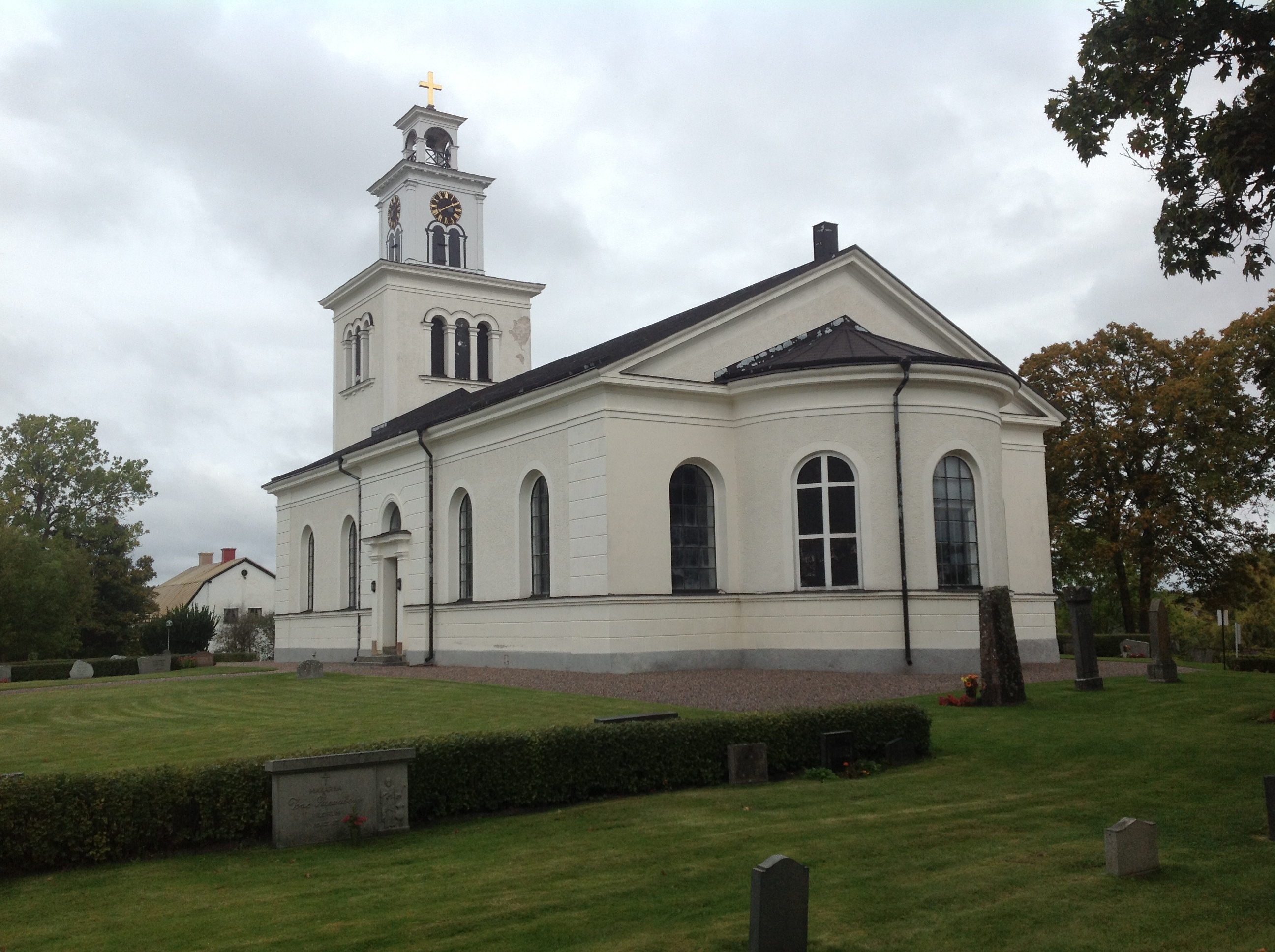 Å kyrka från kyrkogården